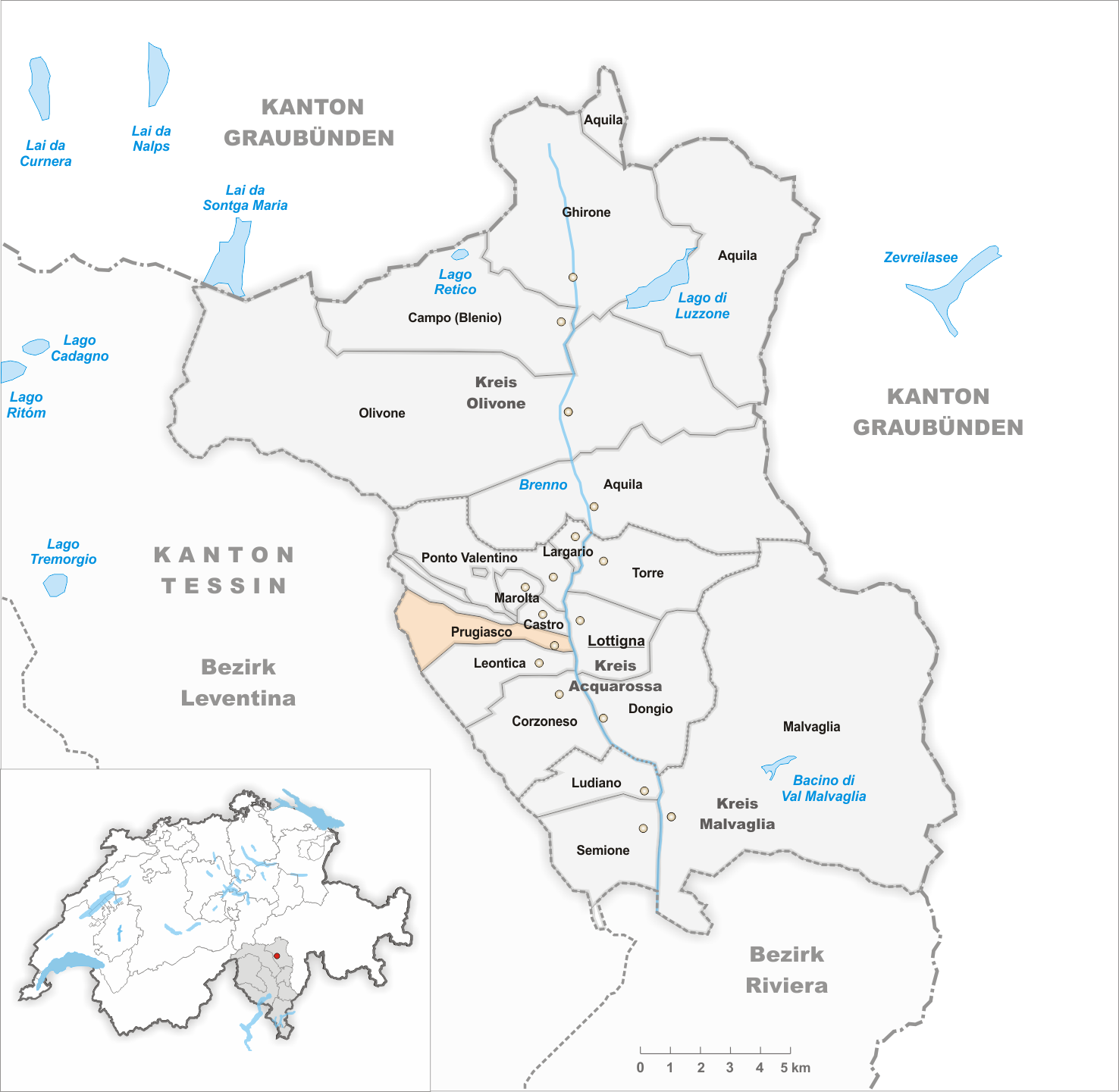 Municipality Prugiasco